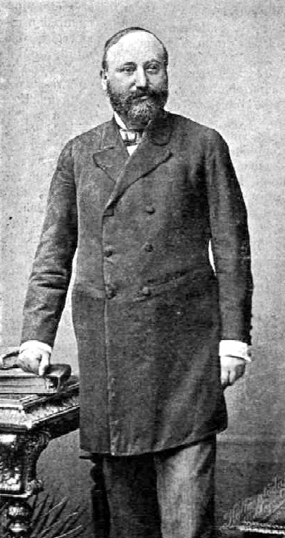 Lukács Béla (1847–1901) politikus, miniszter portréja. Koller Károly utódai fényképfelvétele